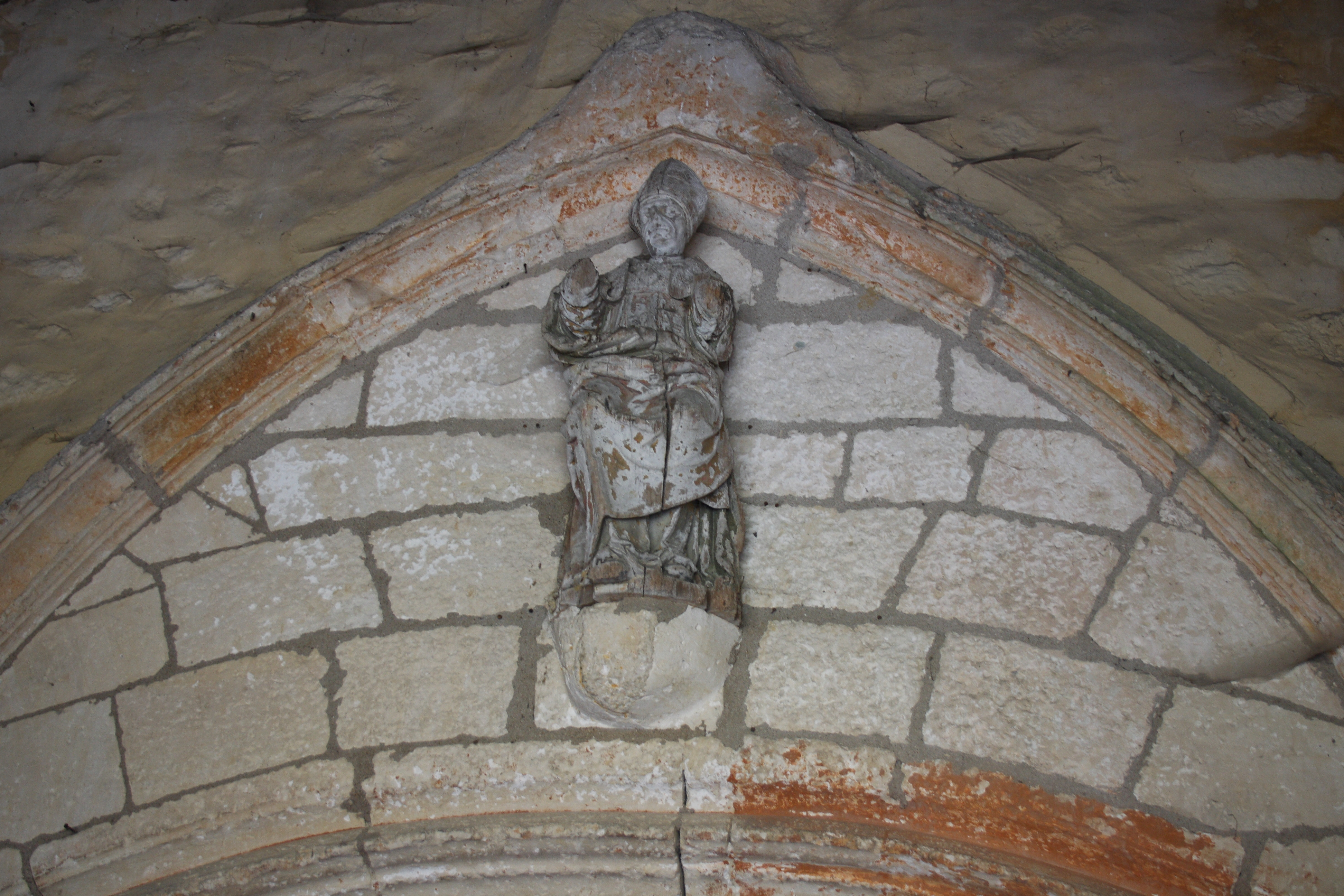 Katholische Pfarrkirche Saint-Germain in La Grande-Paroisse im Département Seine-et-Marne in der Region Île-de-France (Frankreich), Westportal mit einer Holzskulptur des Germanus von Paris (Saint Germain) aus dem 15./16. Jahrhundert